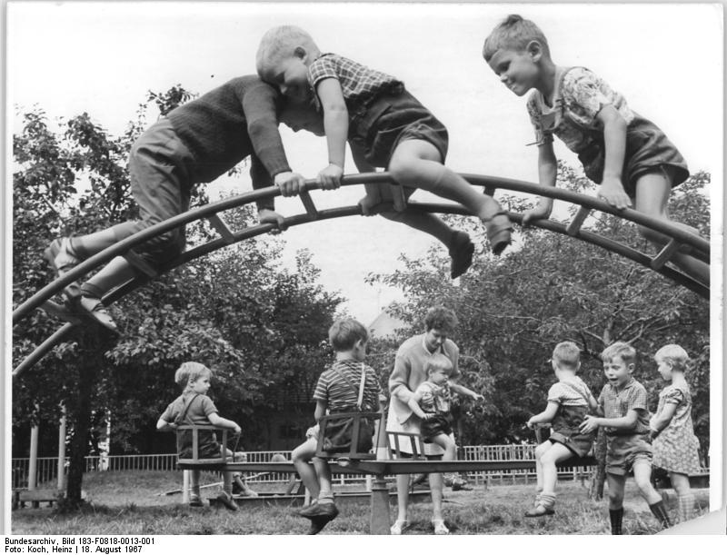 Schenkenberg, Krippenkinder im Spiel Zentralbild Koch 18.8.67 15 ahre LPG "7.Oktober" in Schenkenberg Viel jünger als die Genossenschaft sind die Besucher des Kindergartens, die sich mit frohem Spiel die Zeit vertreiben. In diesen Tagen feiert die Genossenschaft ihr 15-jähriges Bestehen. Für 40 Kinder und die Bewohner der Kinderkrippe stehen Spielplätze, Turngeräte und Sandkästen zur Verfügung.